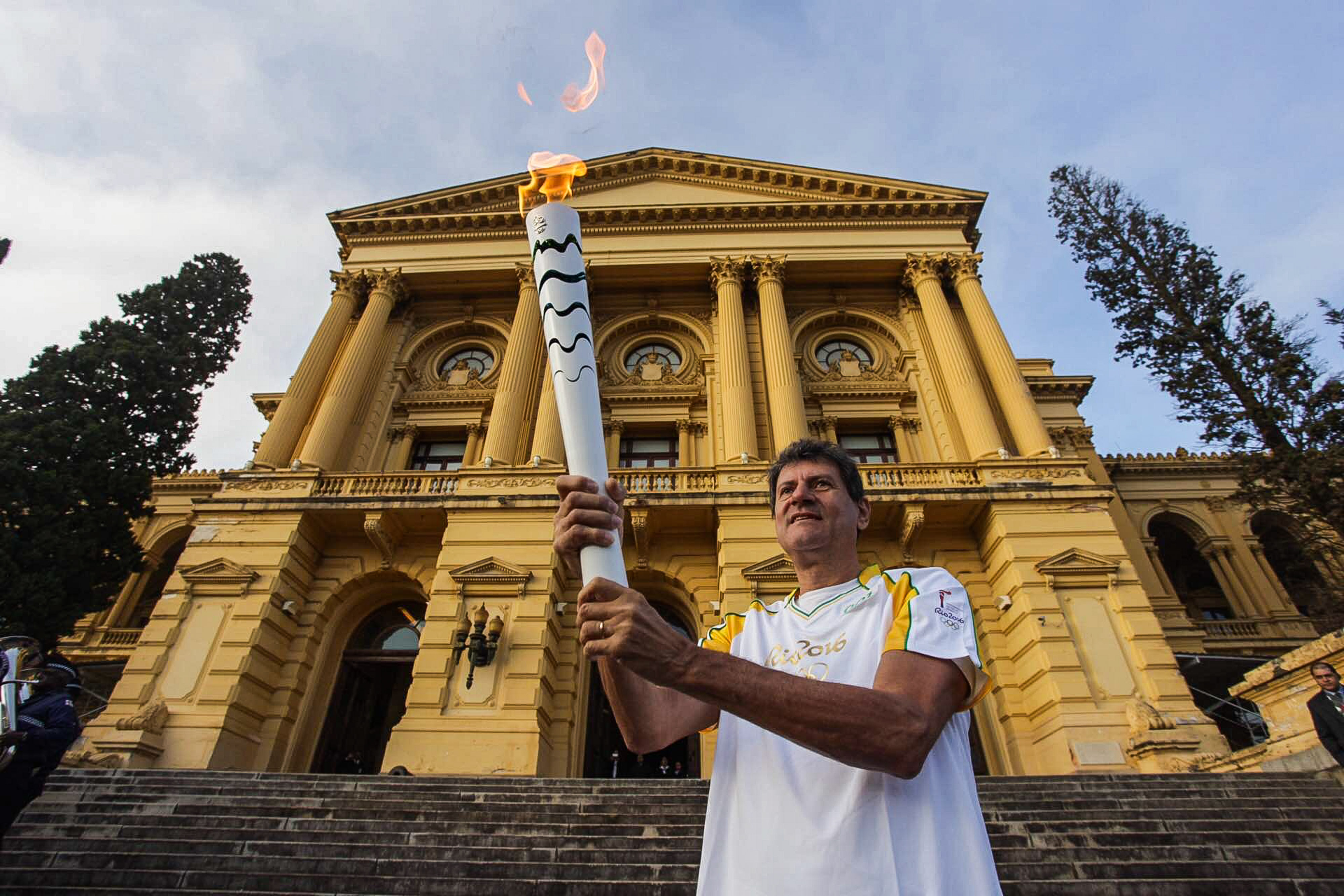 A cidade de São Paulo recebeu neste domingo (24) o revezamento da tocha olímpica. O percurso começou pouco antes das 8h, em frente ao Museu do Ipiranga, e percorreu pontos importantes da capital, como o Obelisco do Ibirapuera (Mausoléu ao Soldado Constitucionalista de 1932), Pinacoteca do Estado, Estação da Luz, Estádio do Pacaembu e o Memorial da América Latina. Foto: Diogo Moreira/ A2IMG